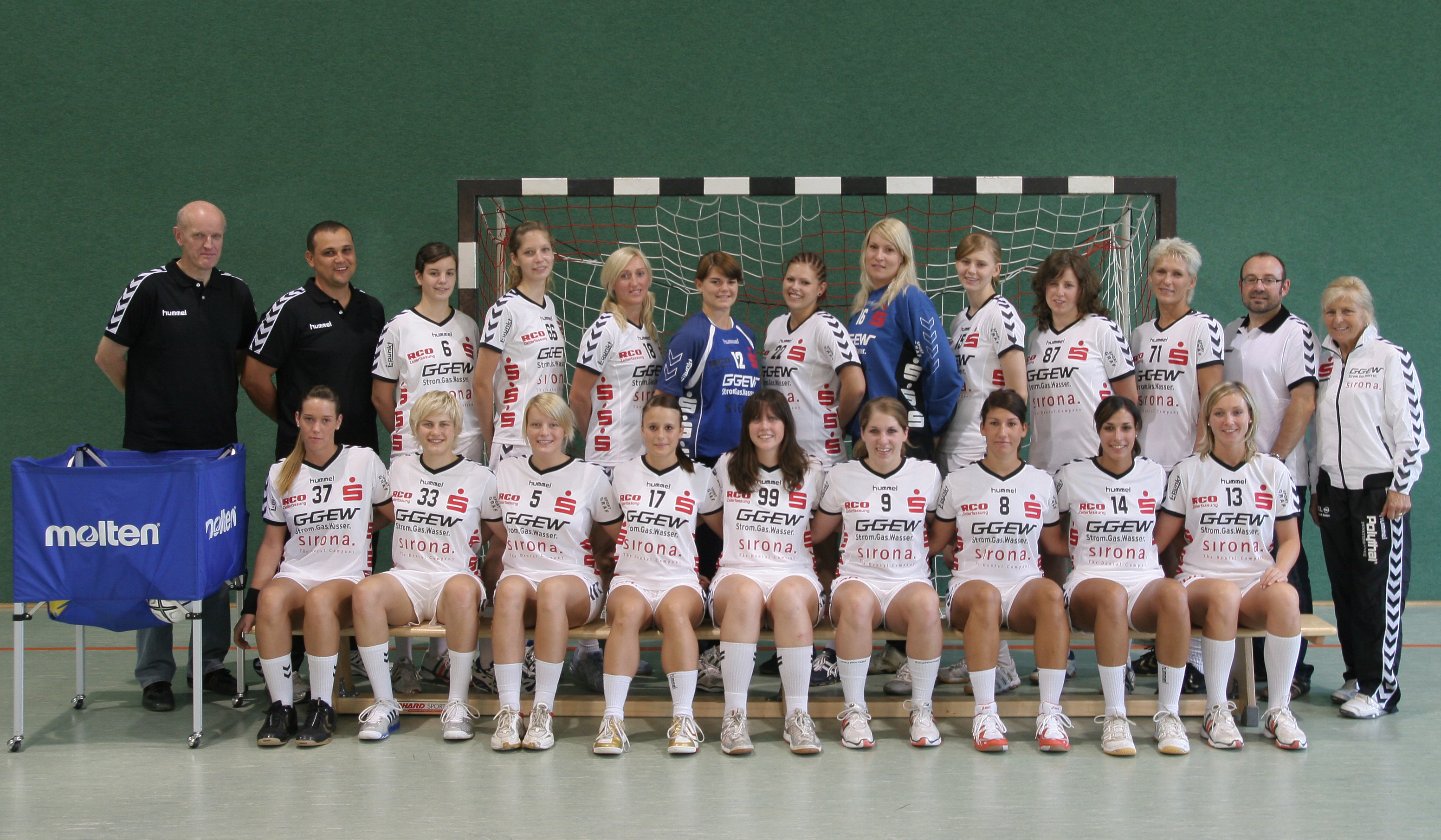 Die erste Frauenmannschaft der HSG Bensheim/Auerbach (2. Handballbundesliga) zu Beginn der Saison 2008/09